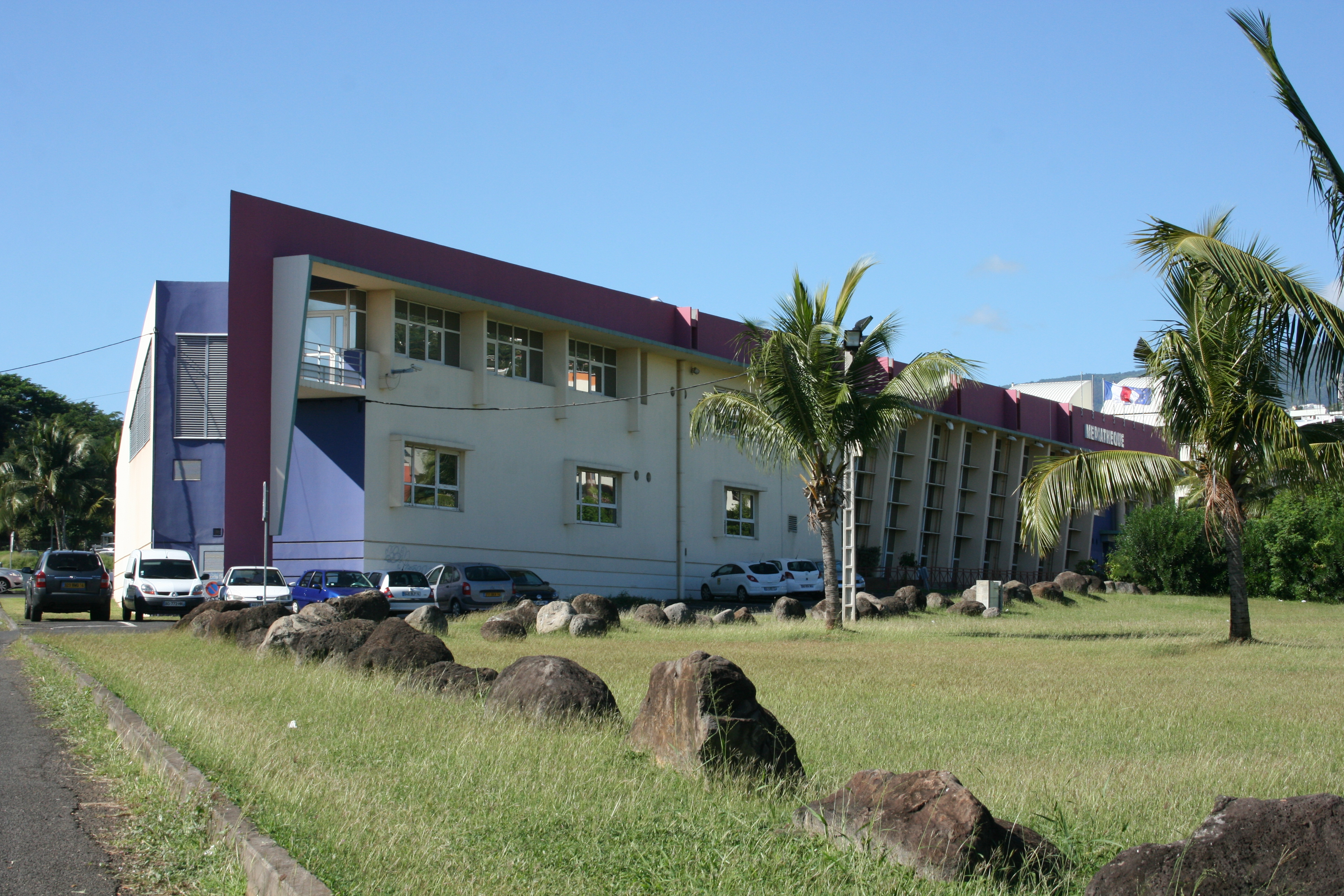 La maison de la Communication François-Mitterrand à Saint-Denis de La Réunion.